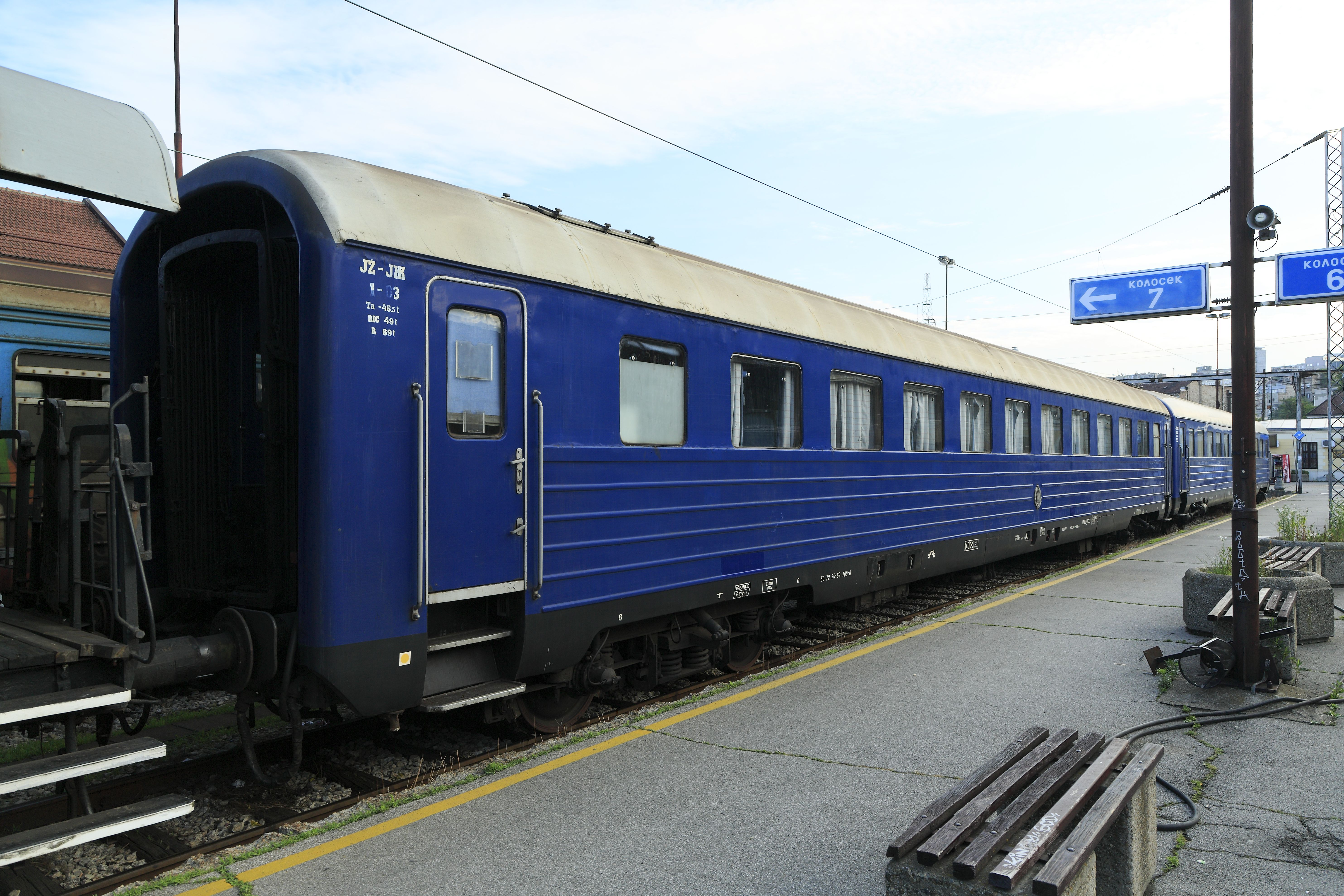 Erste-Klasse-Schlafwagen, offenbar aus dem »Plavi voz«-Bestand. Nach der Beschilderung laufen die Wagen mit Drehgestellen der Bauart Minden-Deutz im Planbetrieb nach Bar. UIC-Wagennummer 50 72 70-69 000